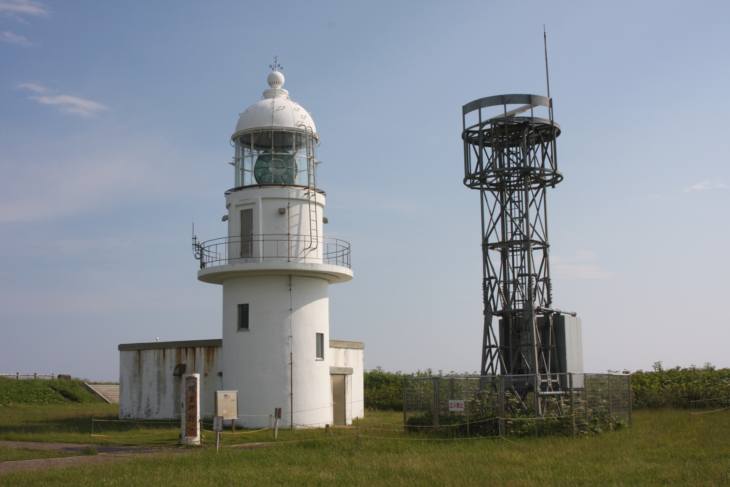 襟裳岬灯台（無線方位信号所廃止後）